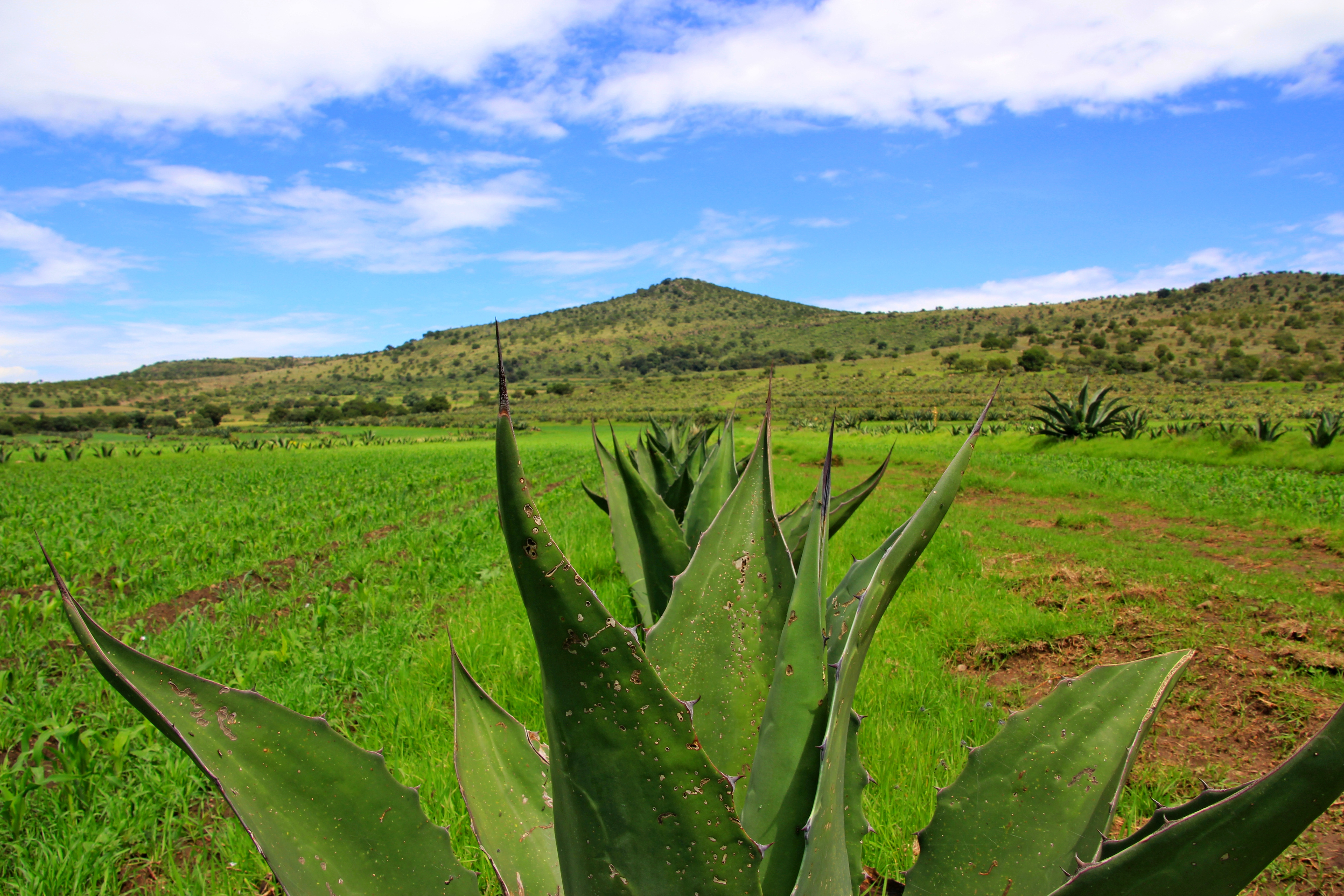 Hacienda pulquera - Tlaxcala